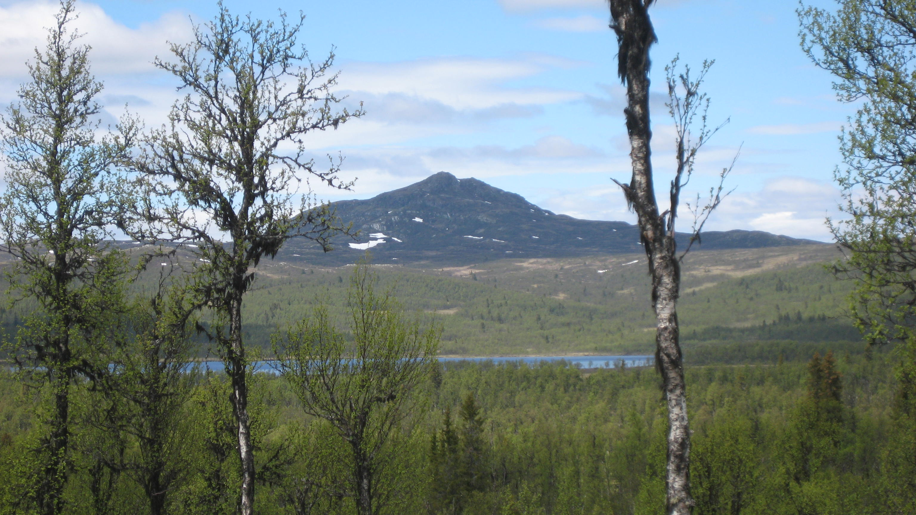 Djuptjernkampen sett fra sør